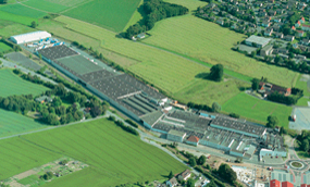 Werksgelände der Oeseder Möbel-Industrie Mathias Wiemann GmbH & Co. KG (Wiemann Möbel) in Georgsmarienhütte-Oesede (Niedersachsen, Deutschland) aus der Vogelperspektive.